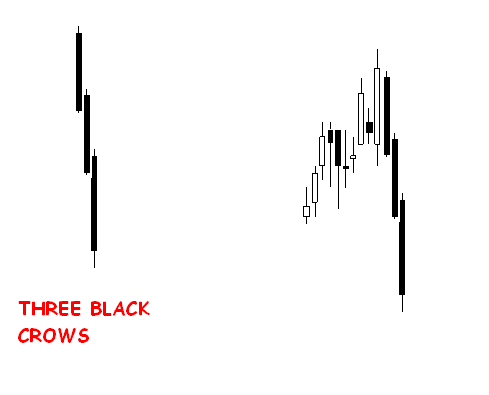 Analisi Tecnica, Candele giapponesi, Three Black Crows